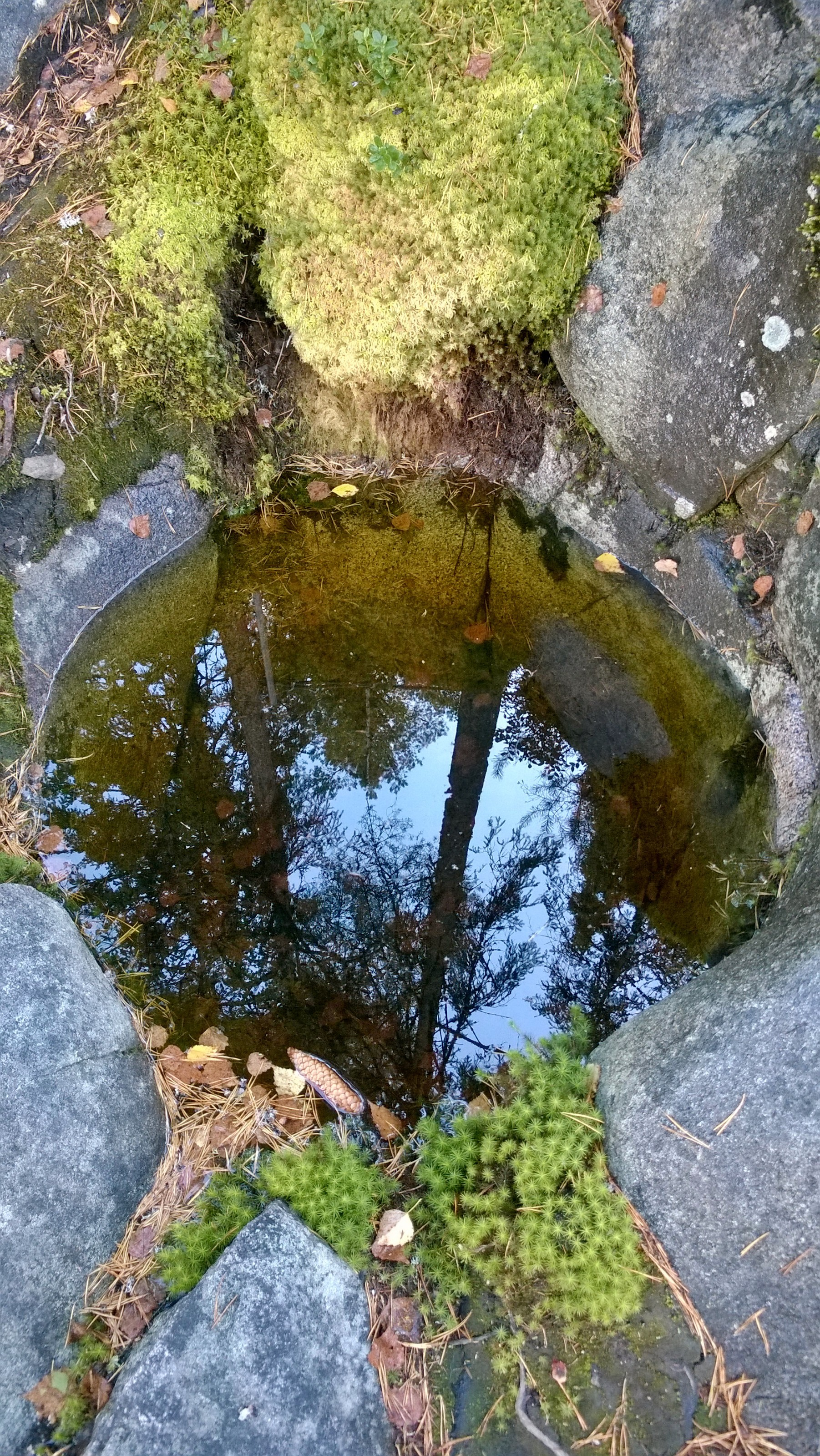 Sammaleet pehmentävät kirnun reunoja.